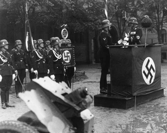 Berlin, Parade zum dritten Jahrestag LSSHA Parade zum dritten Jahrestag der Leibstandarte-SS Adolf Hitler auf dem Kasernengelände der Leibstandarte (ehemalige Hauptkadettenanstalt in Berlin-Lichterfelde), Sepp Dietrich am Rednerpult Abgebildete Personen: Dietrich, Joseph (Sepp): Generaloberst, Ritterkreuz (RK), SS-Oberstgruppenführer, Leibstandarte, Deutschland (GND 11888932X)